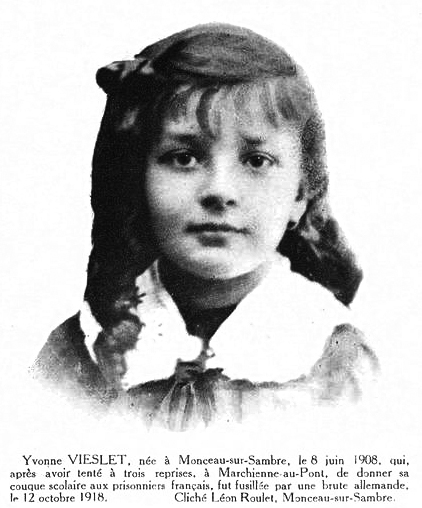 Yvonne Vieslet fusillée par un allemand en 1918 tandis qu'elle souhaitait donner sa collation à un prisonnier français captif à Marchienne-au-Pont